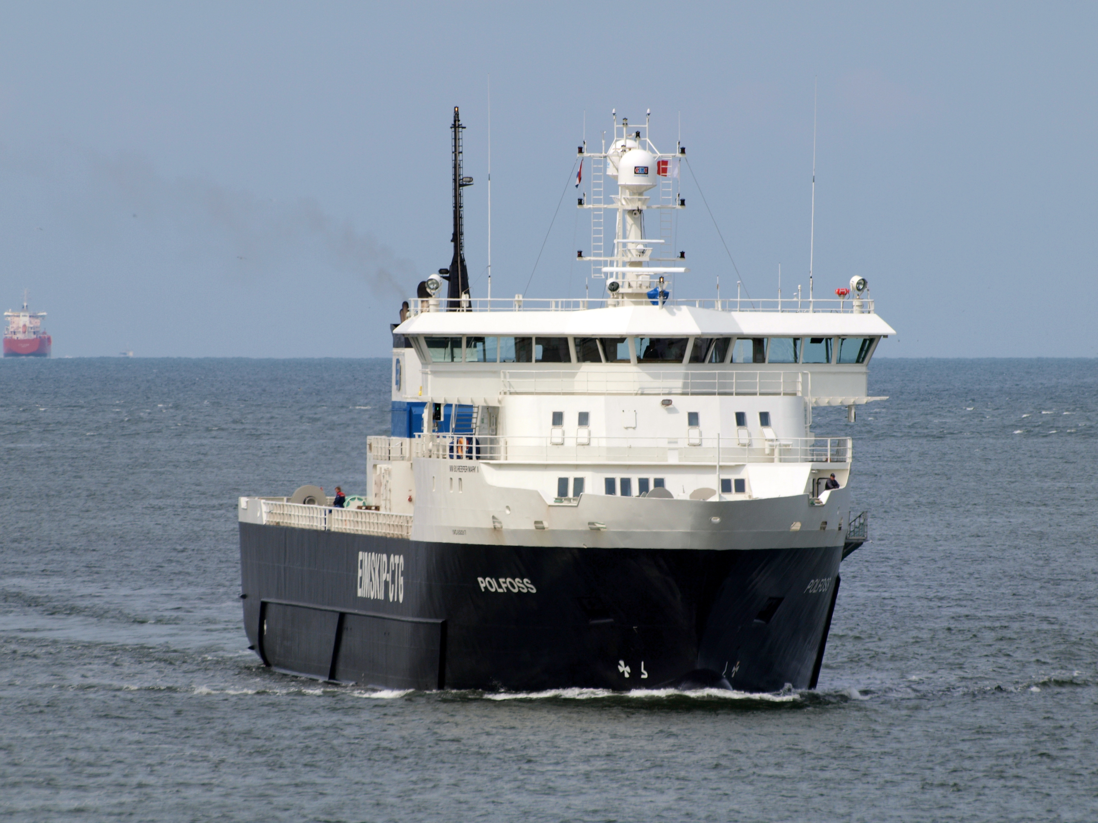 Polfoss - IMO 9393917.